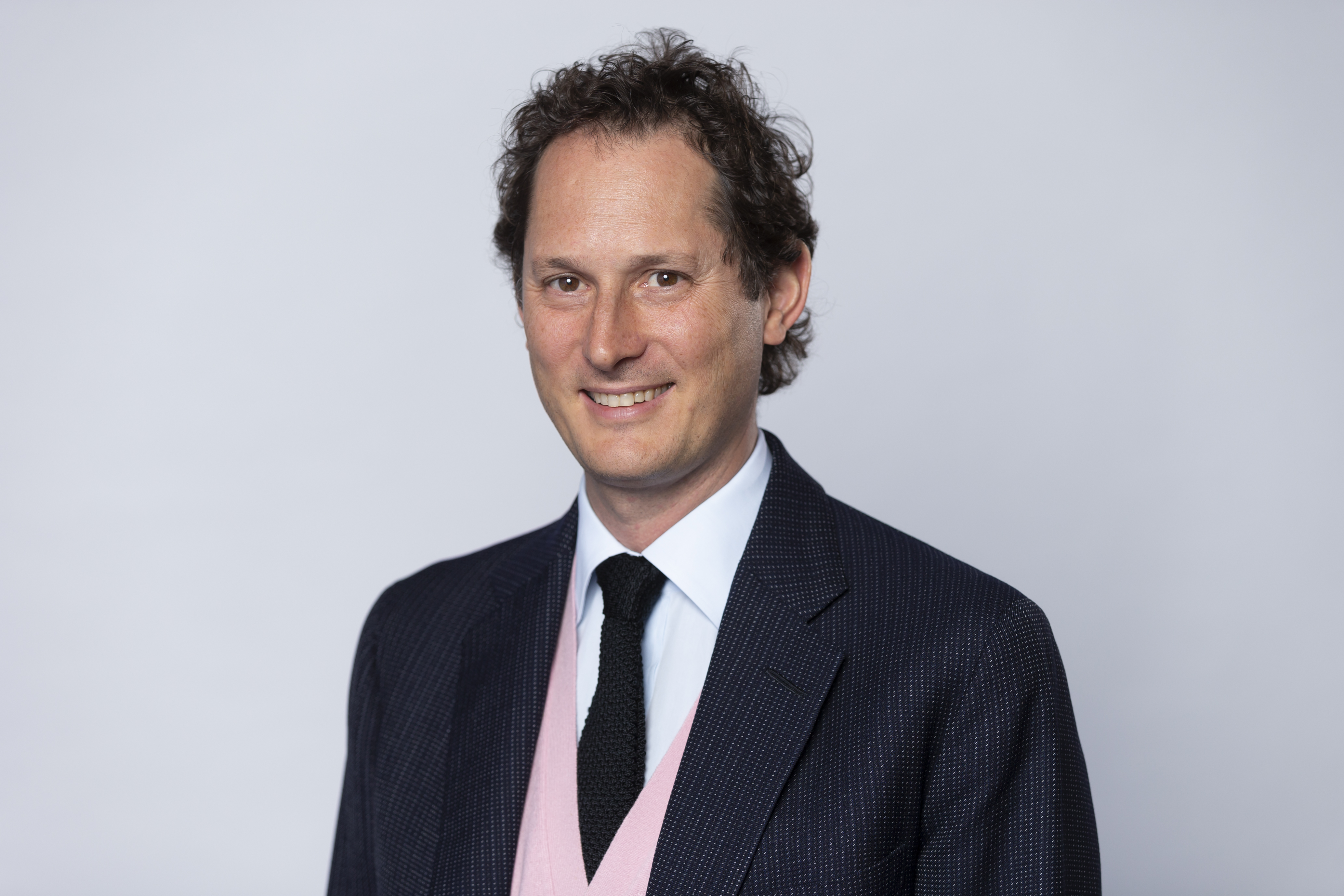 John Elkann.